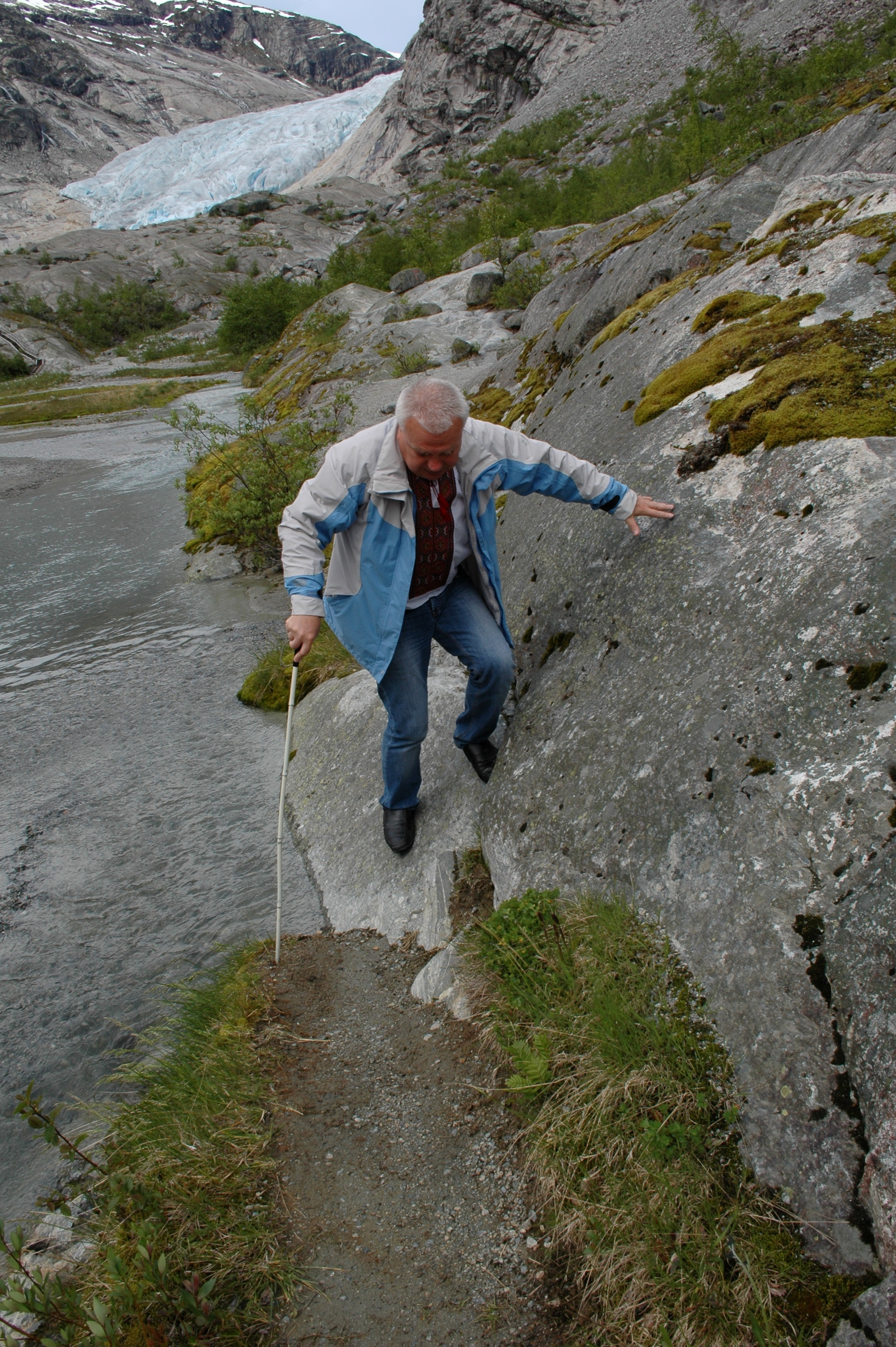 07 червня 2017 року, вперше в світовій історії, В.Б. Петровський самостійно здійснив піший перехід до льодовика Нігардсбрін (Норвегія), чого до нього не робив жоден незрячий в світі.